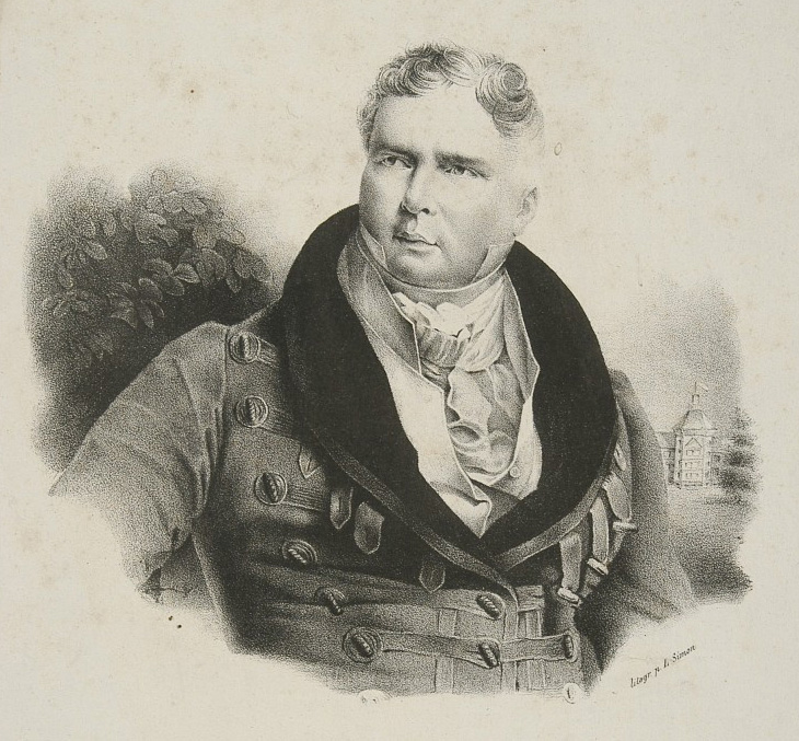 Беларуская (тарашкевіца): Партрэт Антонія Радзівіла (Antoni Radzivił)